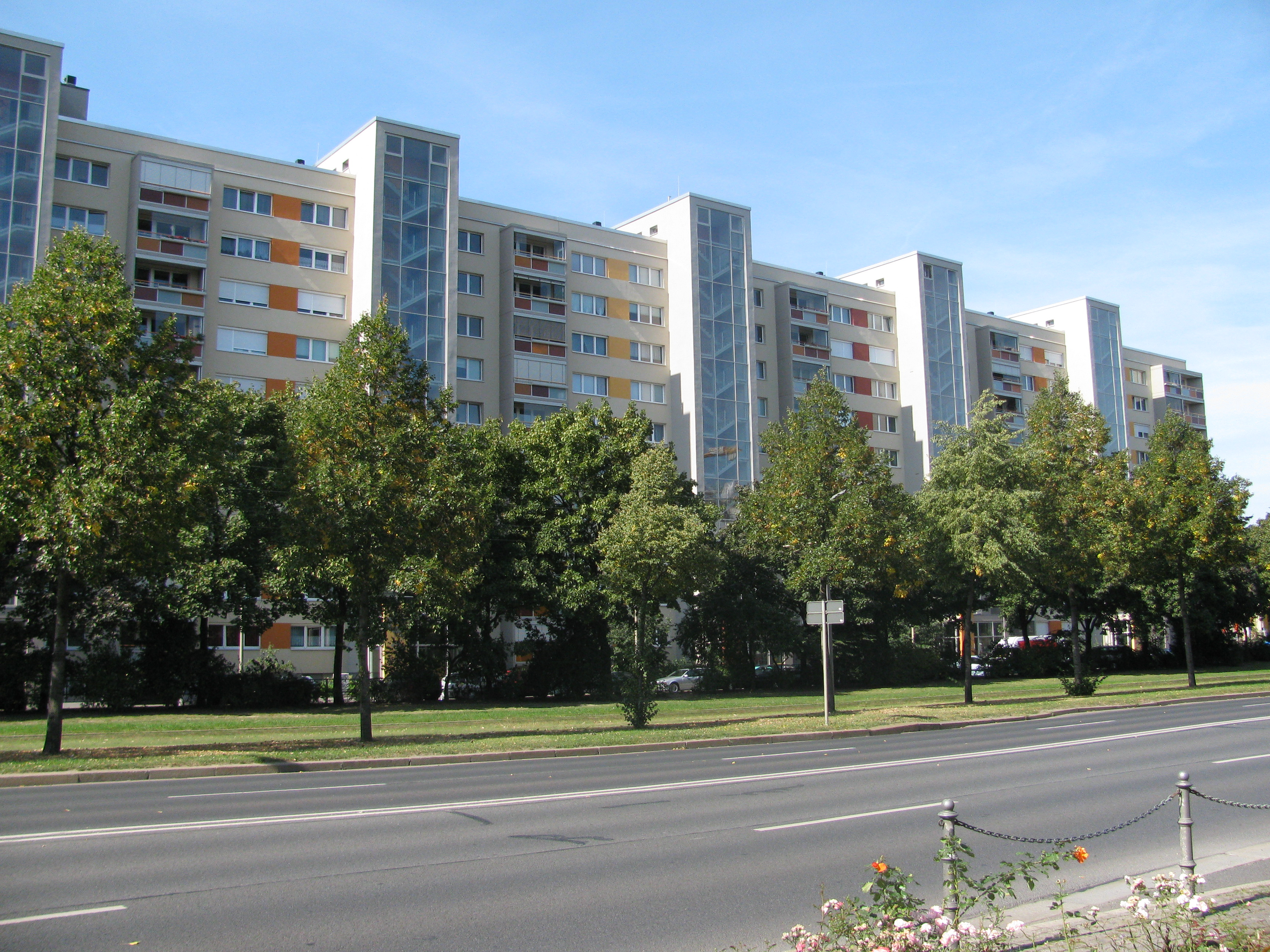 Wohnbebauung entlang der Sarrasanistraße, Dresden, Stadtteil Innere Neustadt. Blick über die Albertstraße.